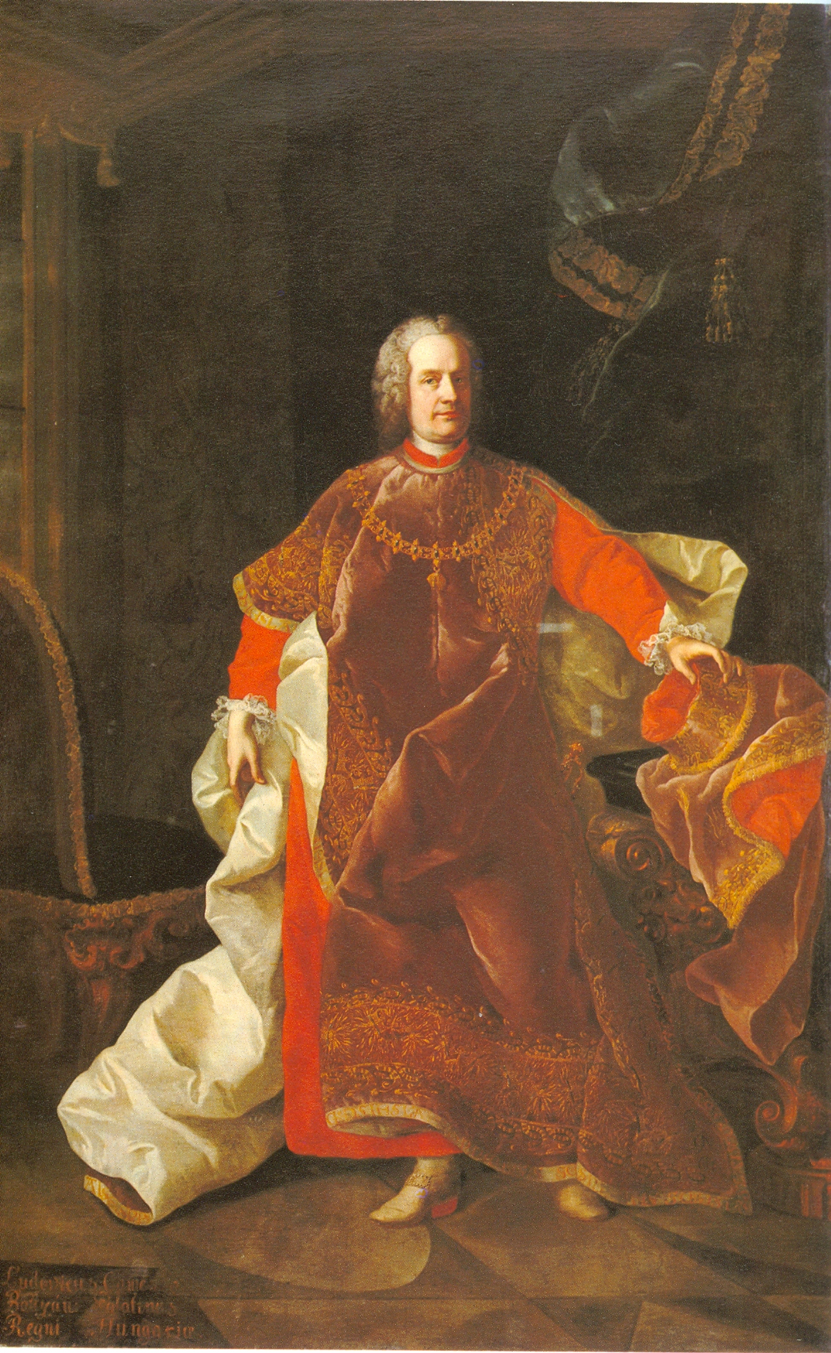 Batthyány Lajos magyar főnemes, kancellár, az utolsó nemzeti nádor.